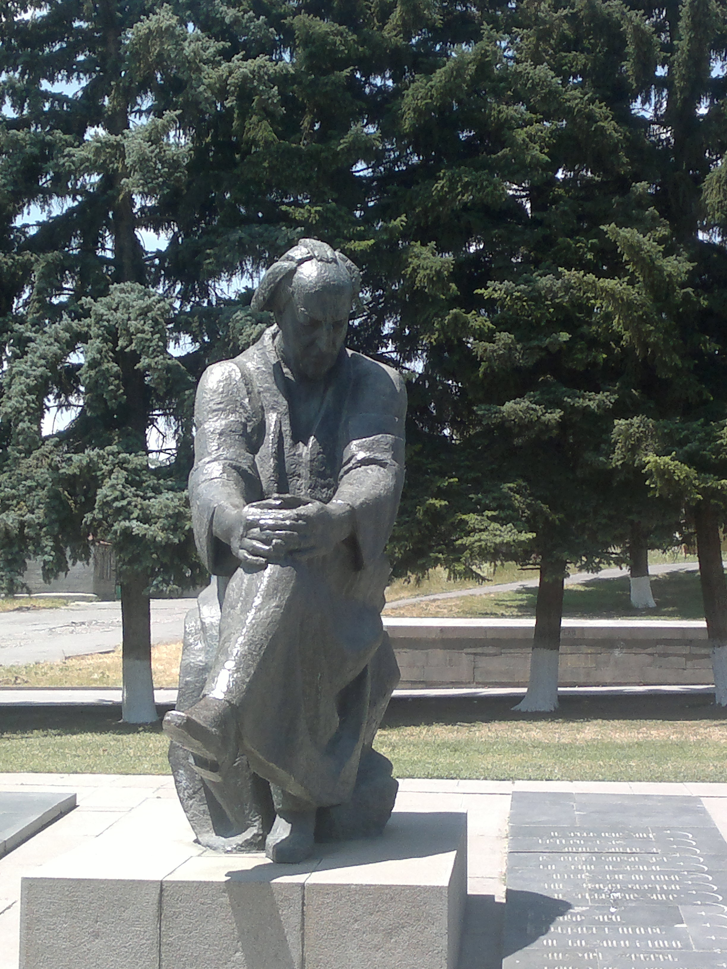 Ավետիք Իսահակյանի հուշարձանը Գյումրու թատերական հրապարակում 1/4.881